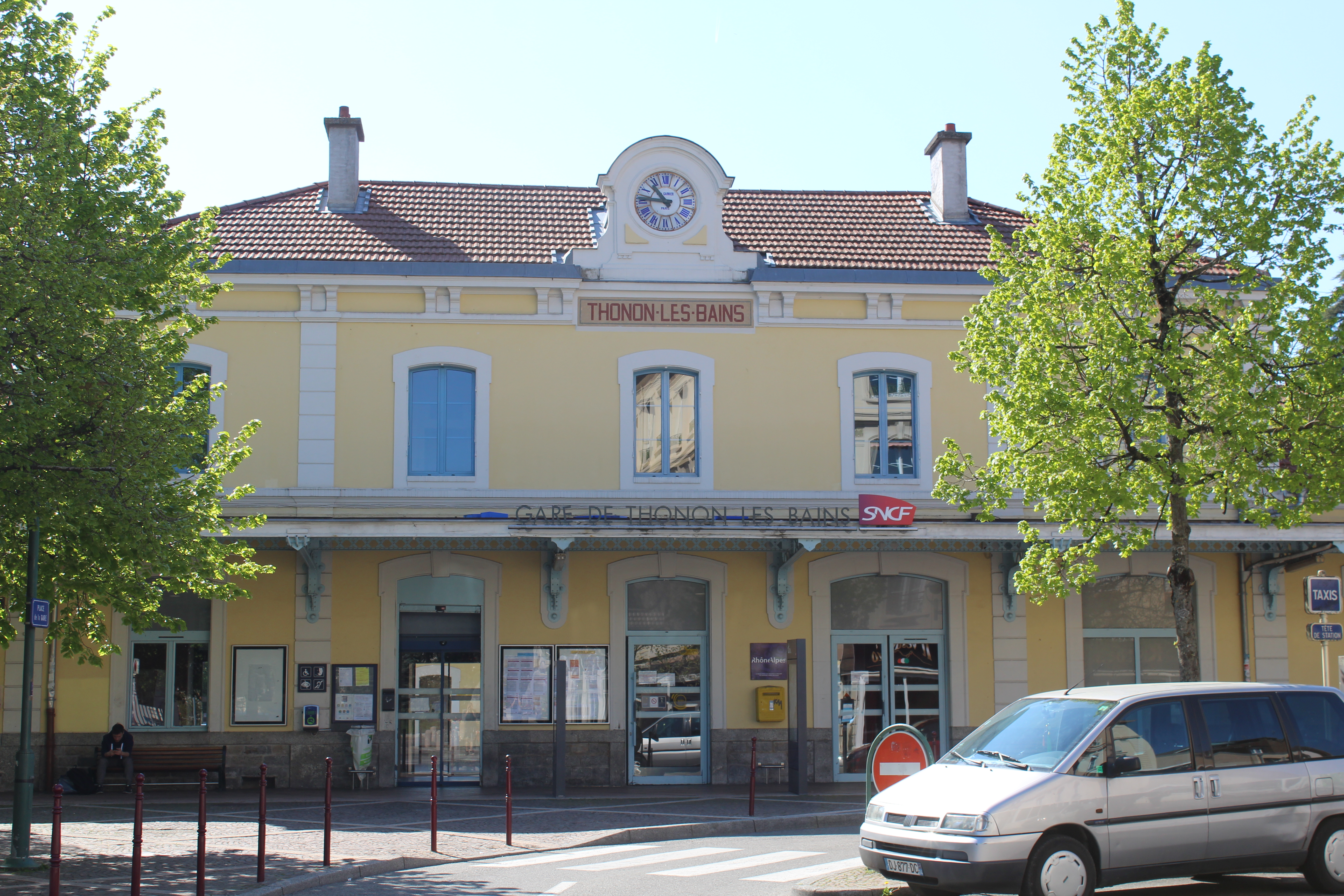 Gare de Thonon-les-Bains.